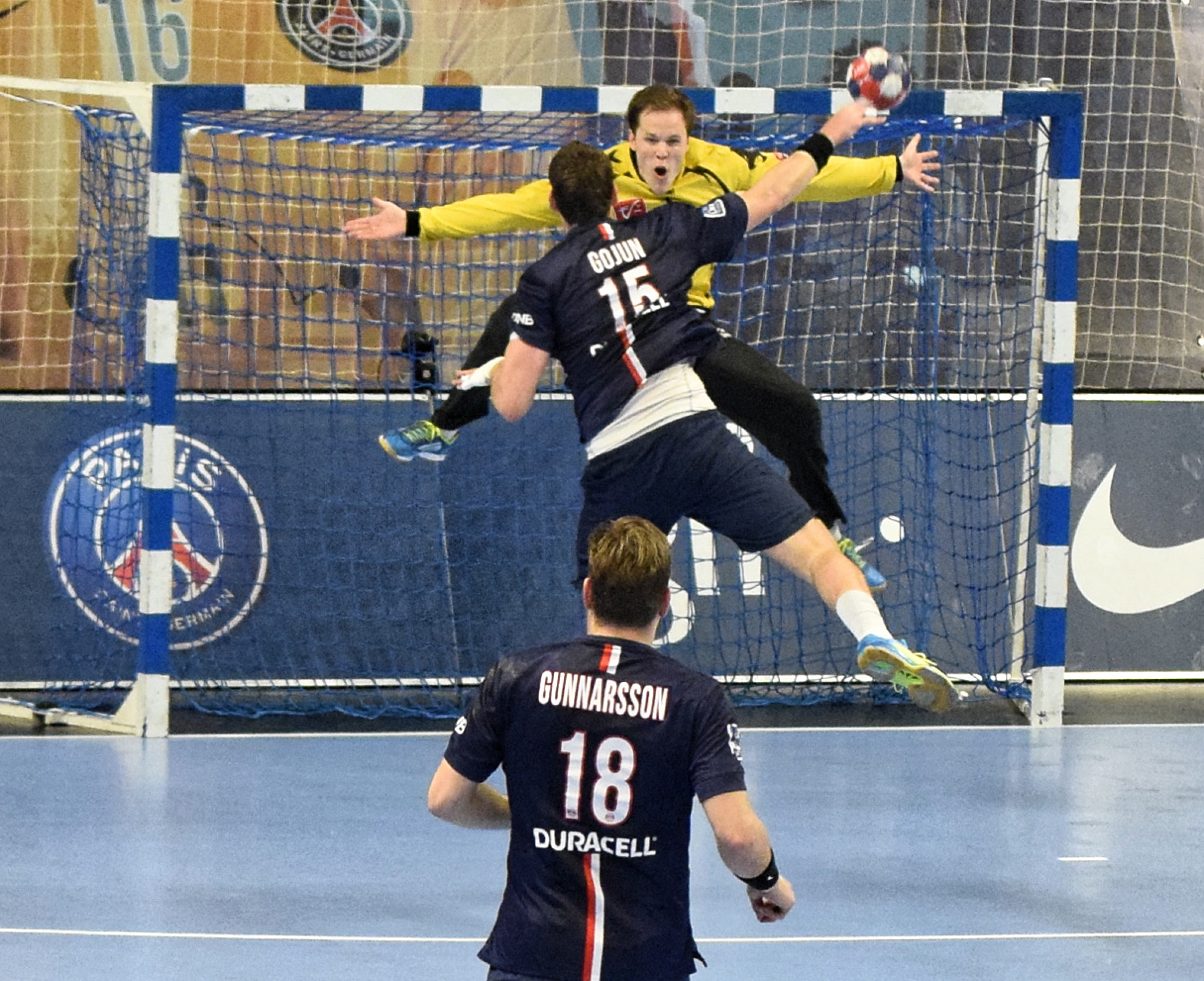 Rencontre de la 20e journée de LNh entre le PSG Handball et Sélestat. A Coubertin, le 08 avril 2015.